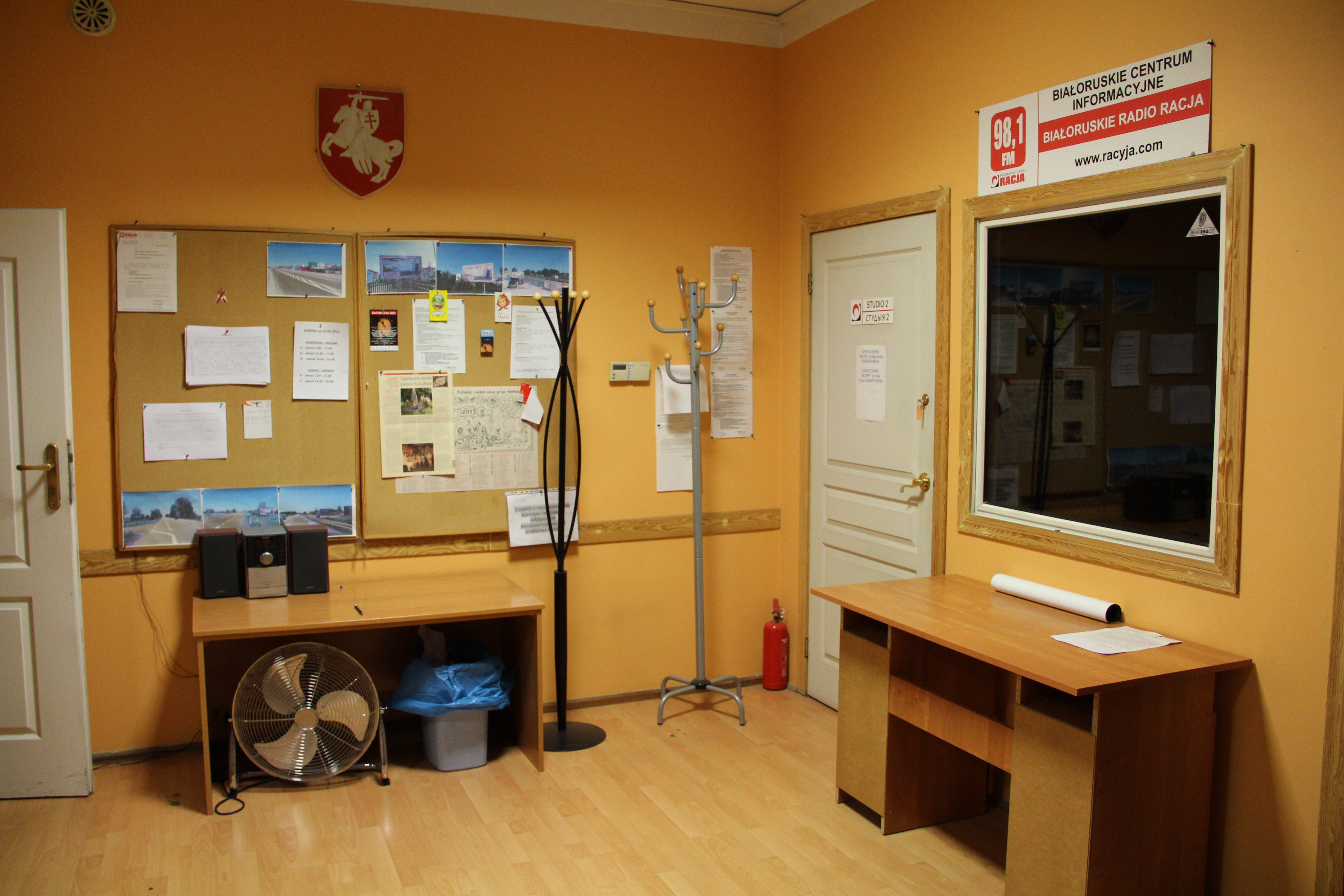 Siedziba Radia "Racja" w Białymstoku.